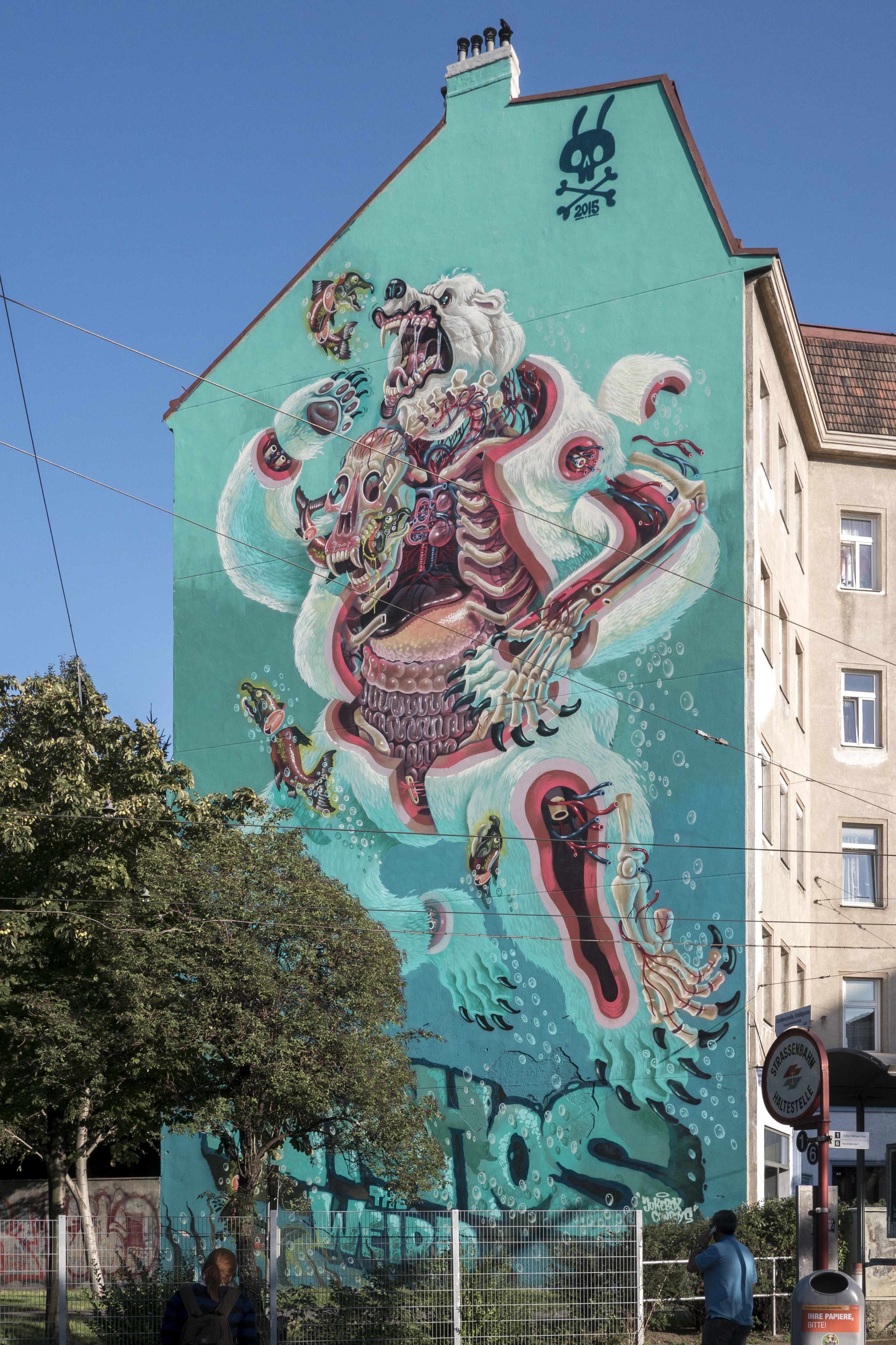 Signiert: Nychos the Weird